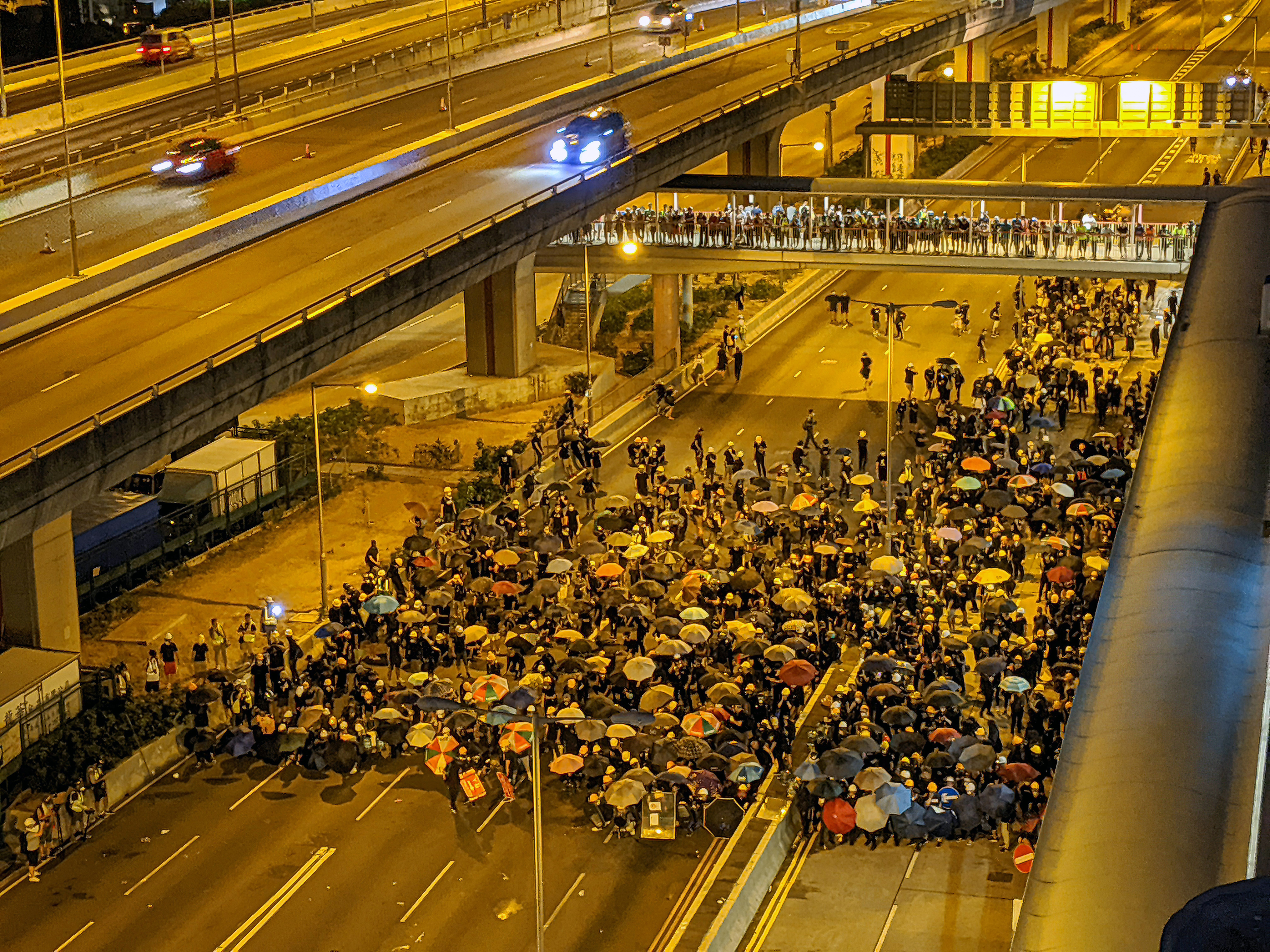 IMG_20190728_193558-edit